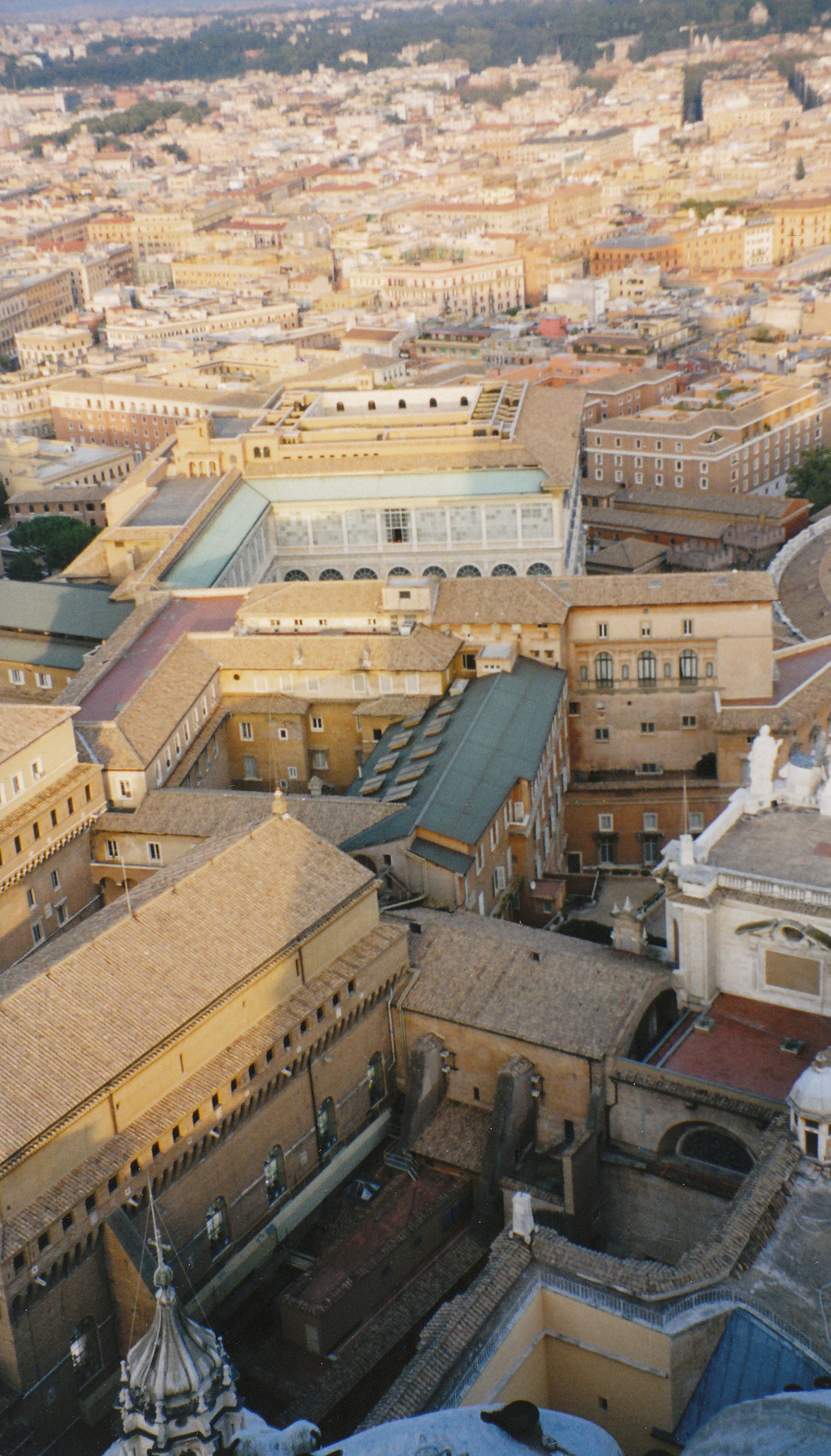 La Palais apostolique du Vatican vu depuis le dôme de la basilique Saint-Pierre. Au premier plan, à gauche, la chapelle Sixtine, puis la cour des perroquets puis la cour Saint-Damase puis le palais de Sixte-Quint.